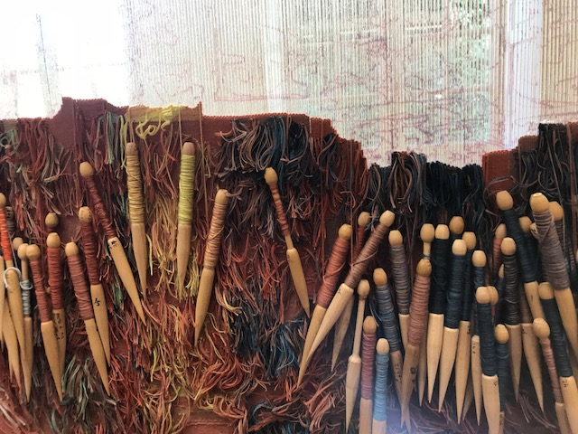 Broche pendant le tissage